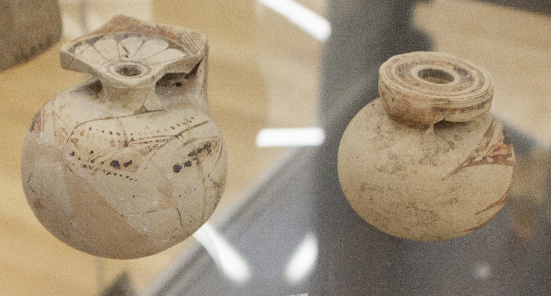 570-550 a.C. Monte Bubbonia - necropoli